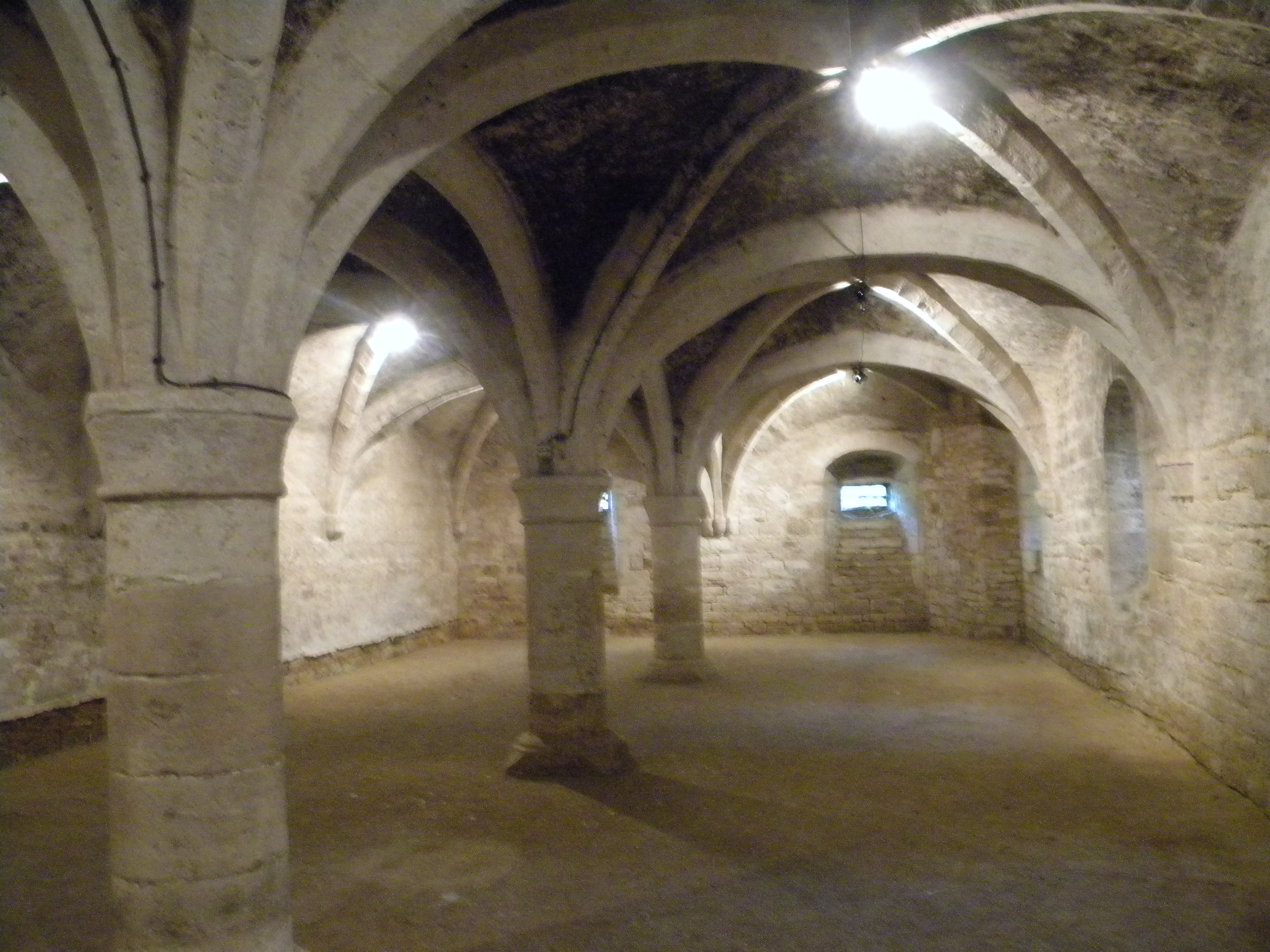 vinkelo